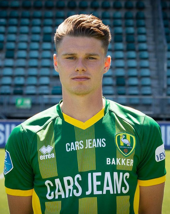 Danny Bakker